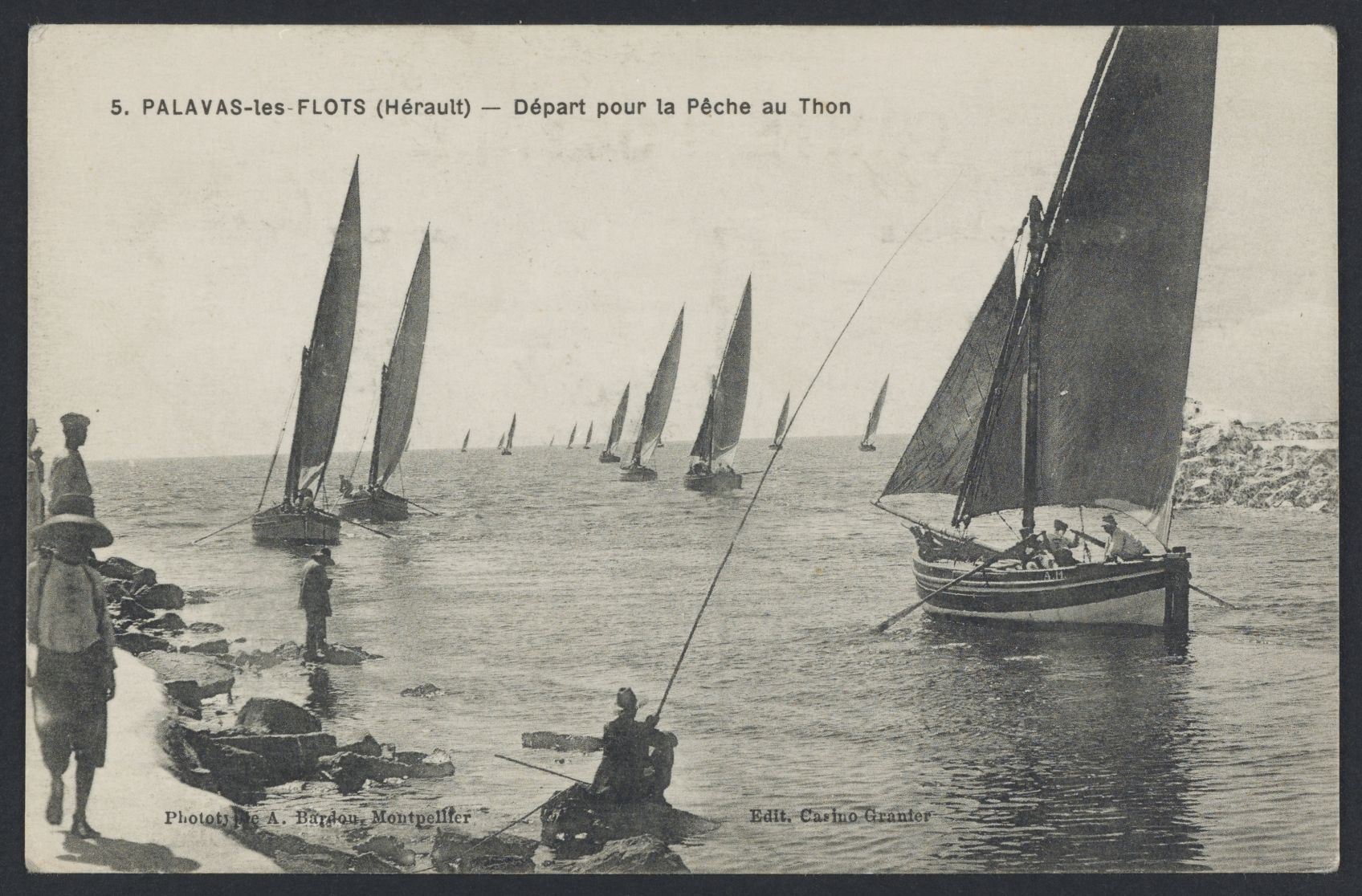 Palavas-les-Flots. - Départ pour la pêche au thon : carte postale.